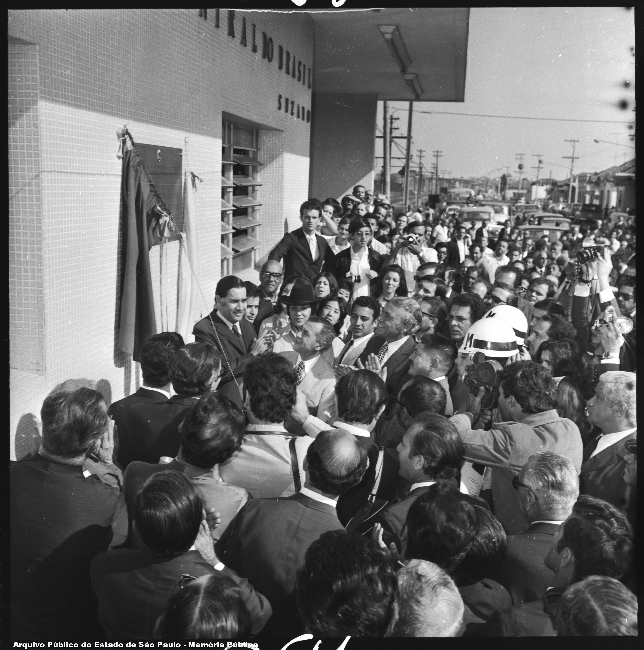 Suzano - Nôvo trecho de Anel Ferroviário do Grande São Paulo. O Governador Laudo Natel, em Suzano, prestigia o ato inaugural presidido pelo ministro Mario Andreazza do nôvo trecho de 41 quilometro do Anel Ferroviário do Grande São Paulo - Foto da coleção "Secretaria de Governo" do Arquivo Público do Estado de São Paulo, código de referência BR APESP SEGOV ICO NEG 3277 02